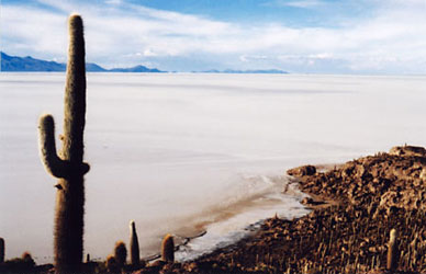 Isla de Pescado, Salar de Uyuni, Bolivia